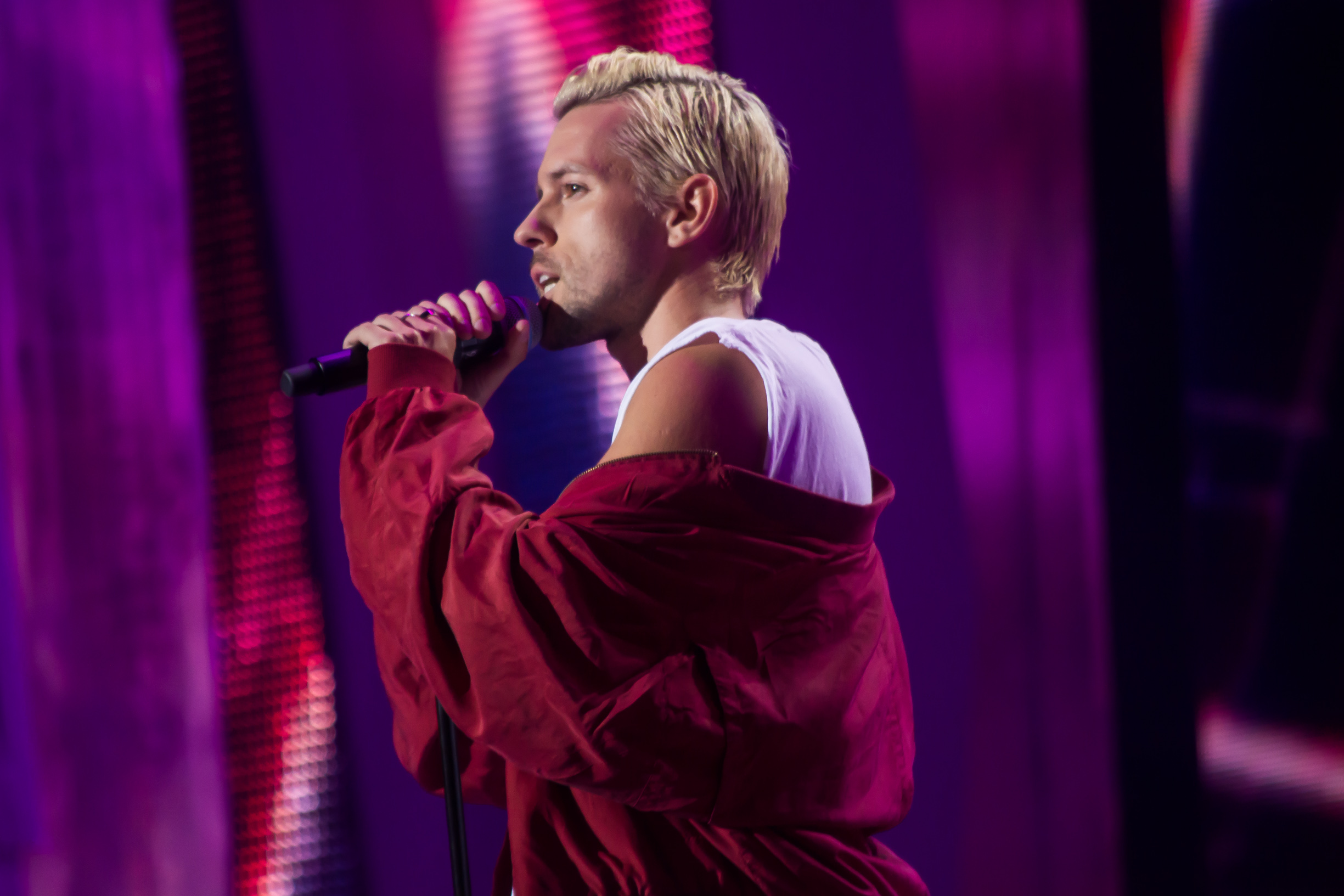 Markus Riva на Europa Plus TV. Hit Non Stop в Витебске 2016